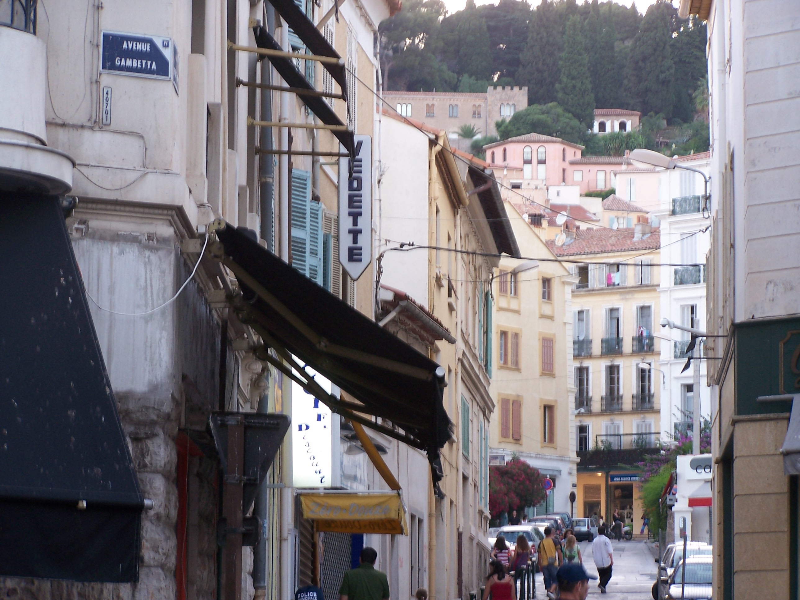 Vue de la vieille-ville d'Hyères